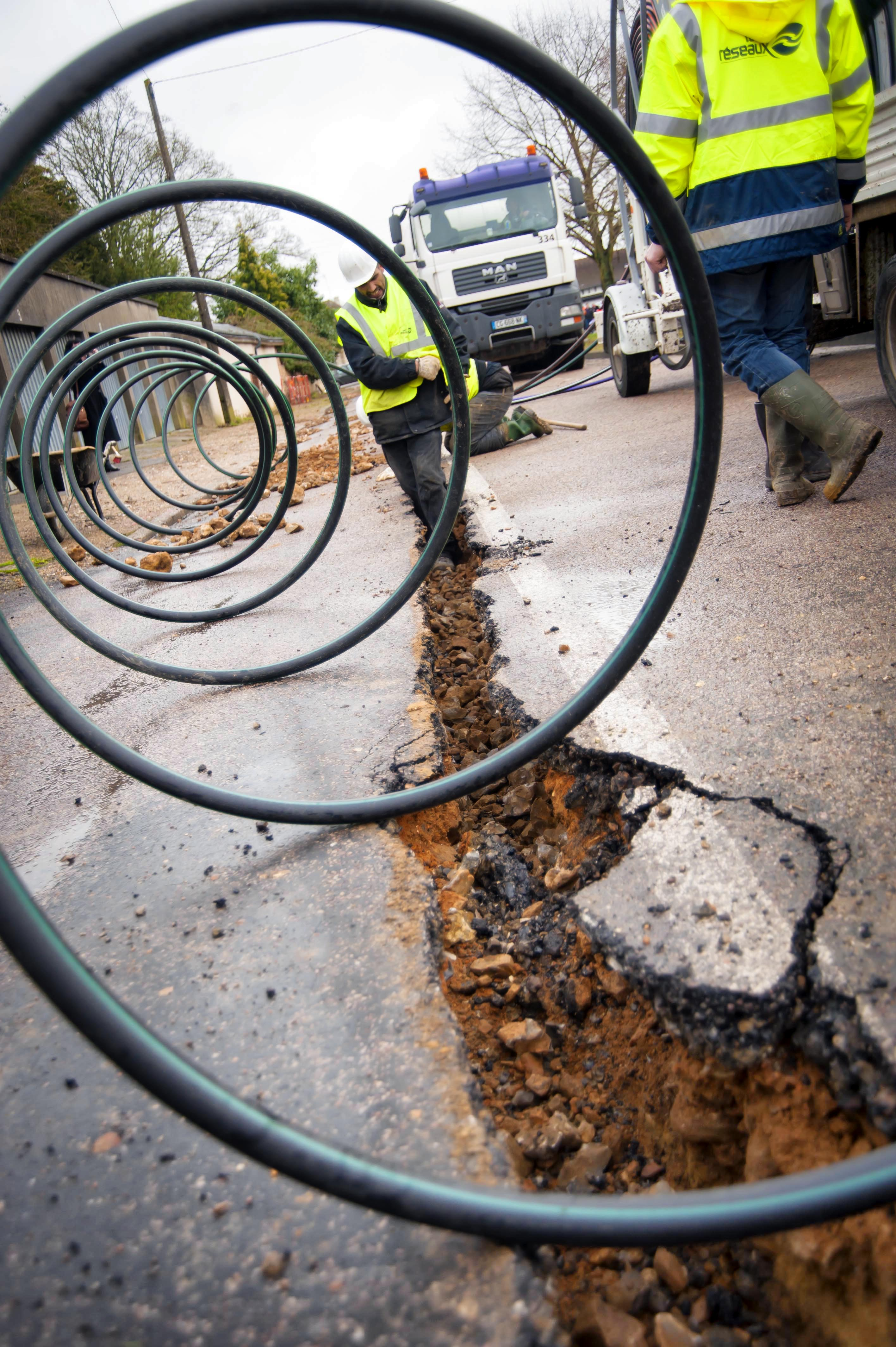 Installation de fibre optique pour le THD dans le canton de Conches-en-Ouche (27)